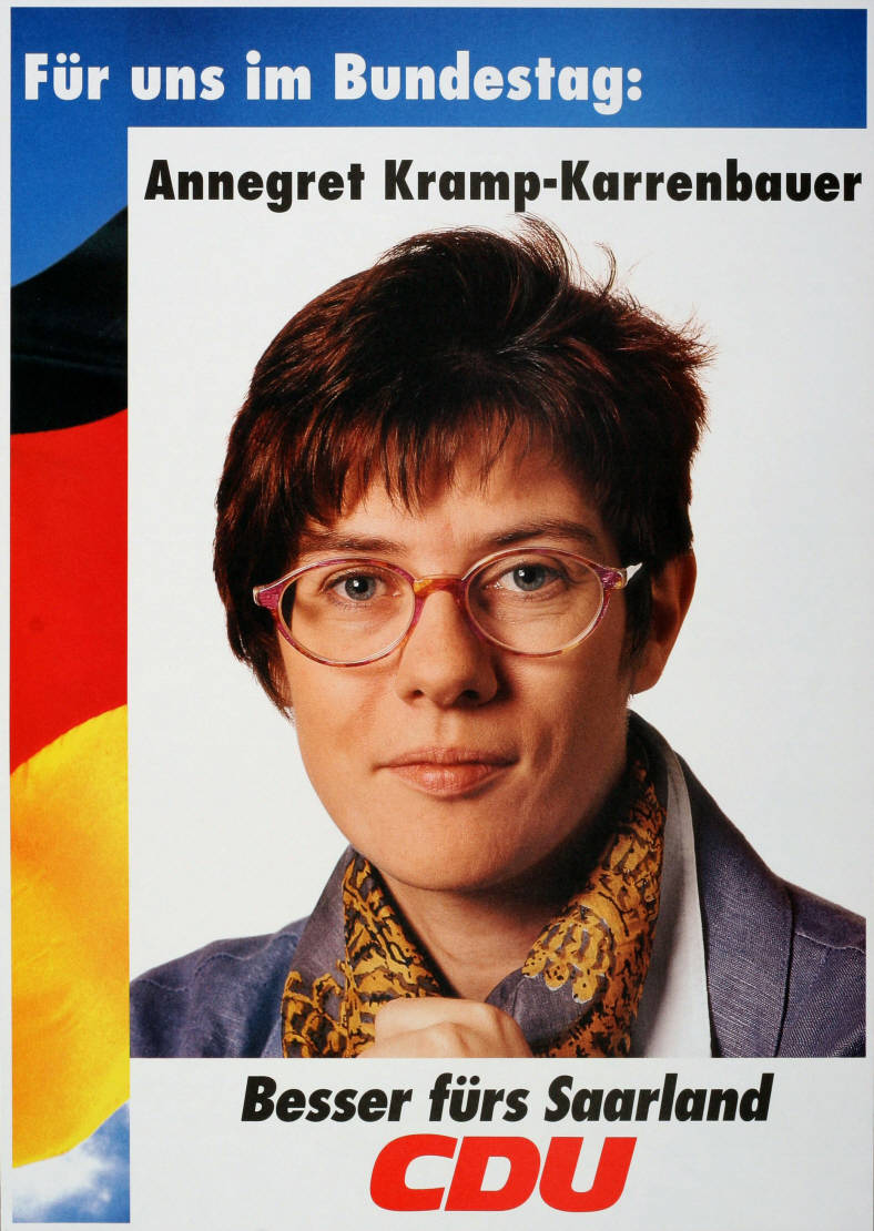 Für uns im Bundestag: Annegret Kramp-Karrenbauer Besser fürs Saarland CDU Abbildung: Porträtfoto - Nationalfarben Plakatart: Kandidaten-/Personenplakat mit Porträt Objekt-Signatur: 10-001: 4008 Bestand: Plakate zu Bundestagswahlen (10-001) GliederungBestand10-18: Plakate zu Bundestagswahlen (10-001) » Die 13. Bundestagswahl am 16. Oktober 1994 » CDU » Mit Porträtfoto Lizenz: KAS/ACDP 10-001: 4008 CC-BY-SA 3.0 DE